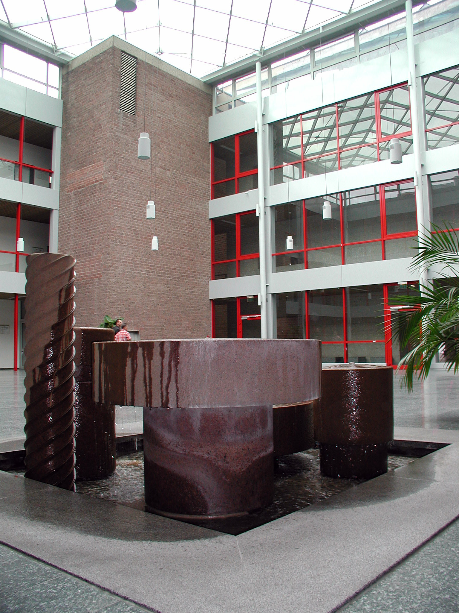 Köln-Rathaus, Lichthof im Südflügel